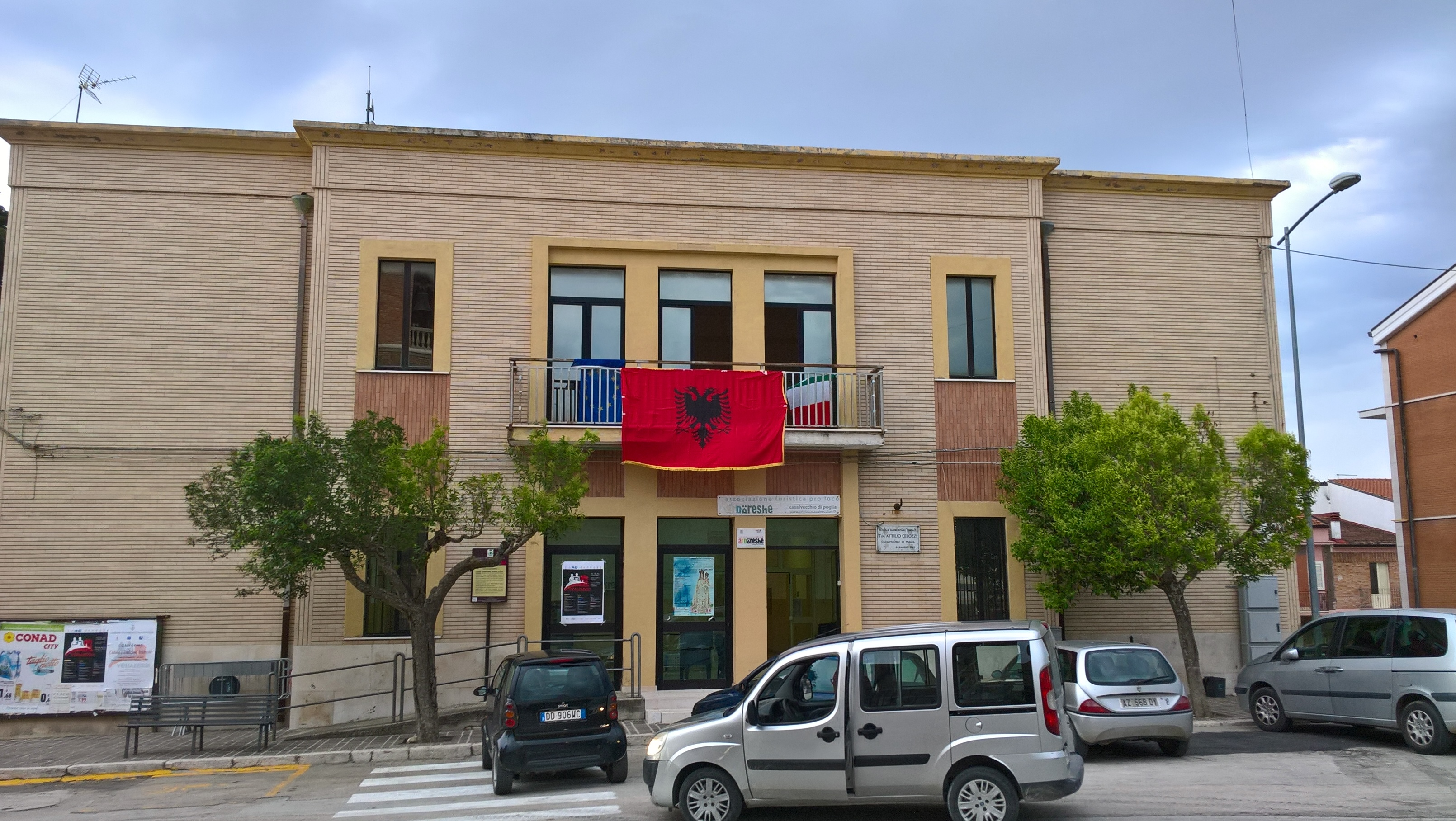 Casalvecchio di Puglia - Rsthaus